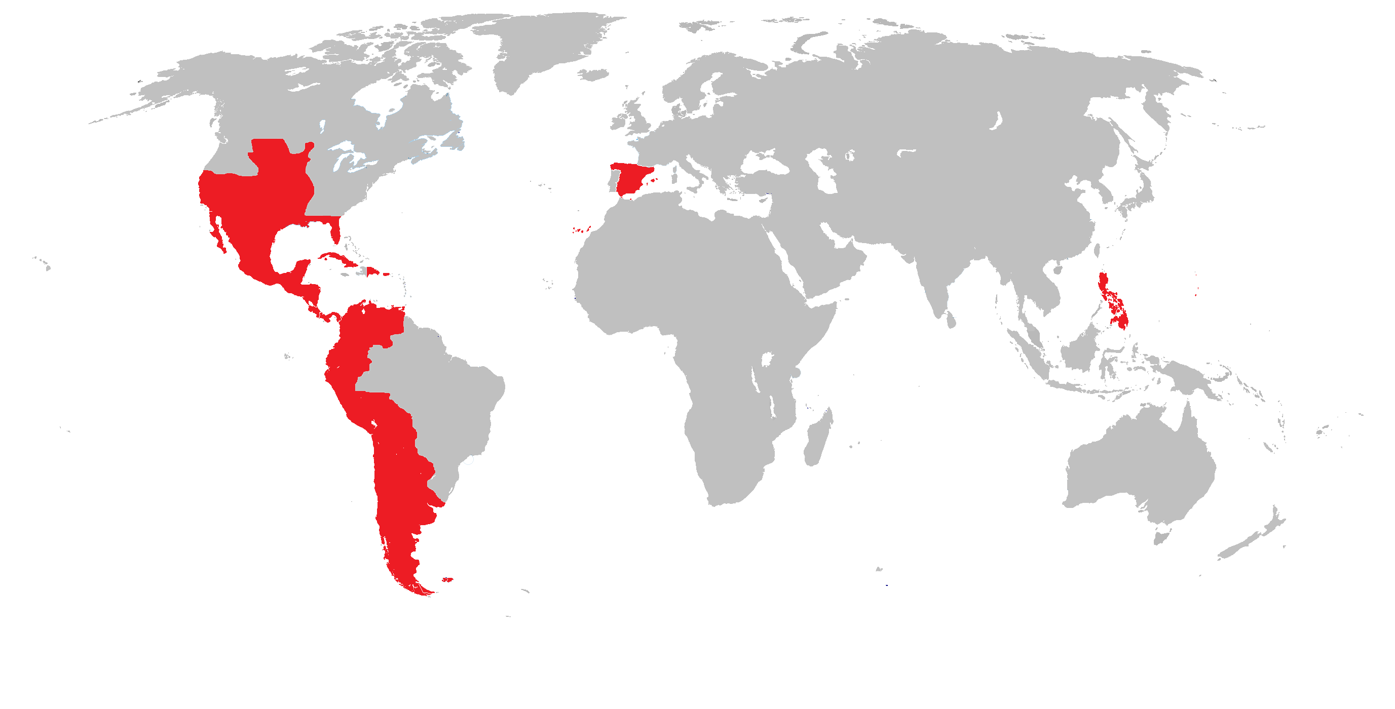 Expansion del imperio español durante el absolutismo Borbonico